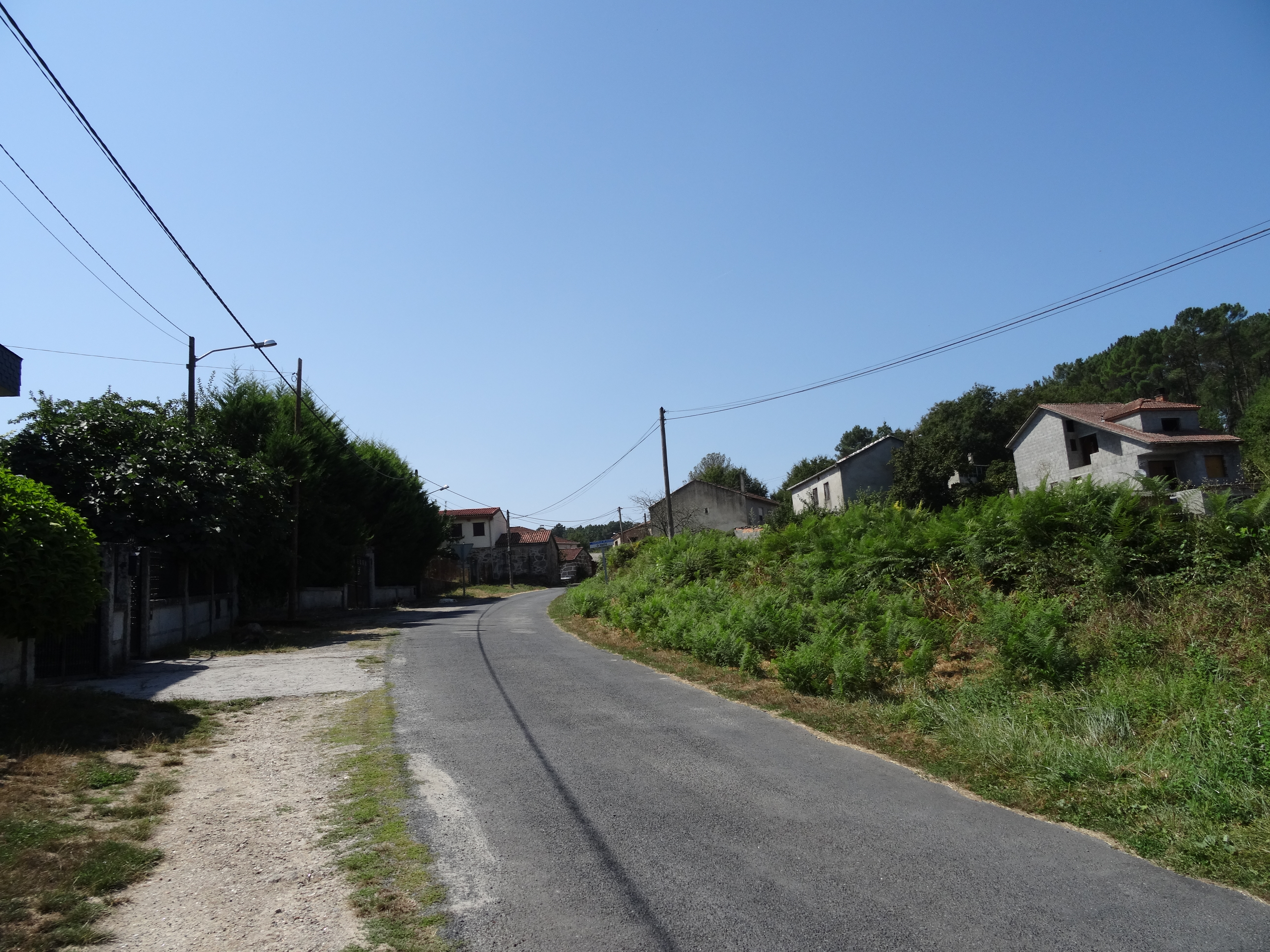 Ver título.